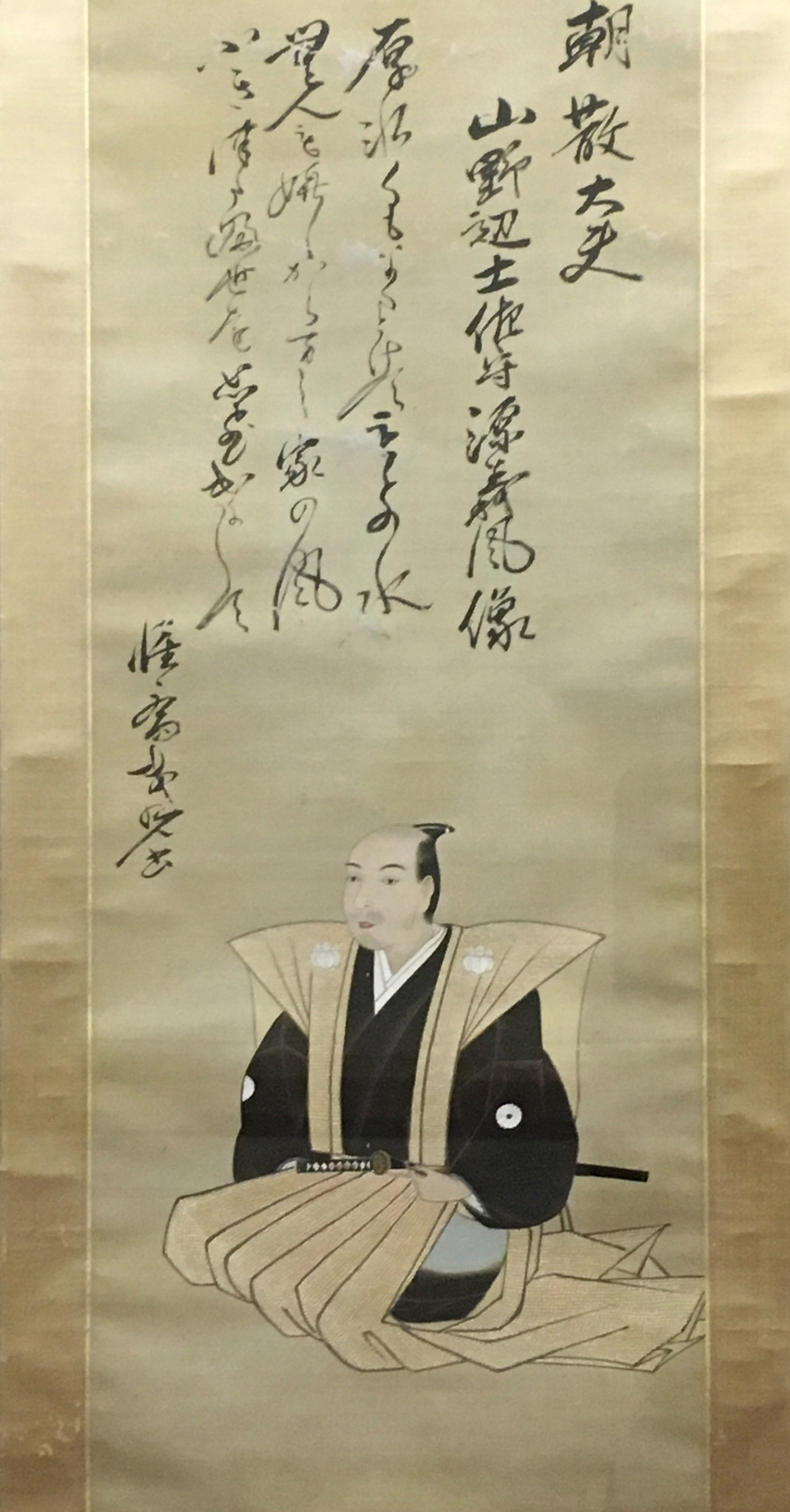 常陸水戸藩家老・山野辺義風の肖像画。